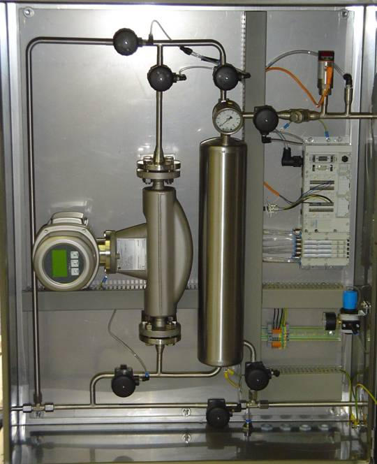 Platomass von Endress+Hauser